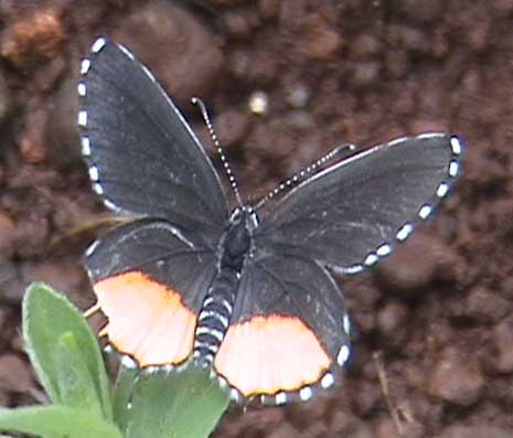 Talicada nyseus (Guerin, 1843)